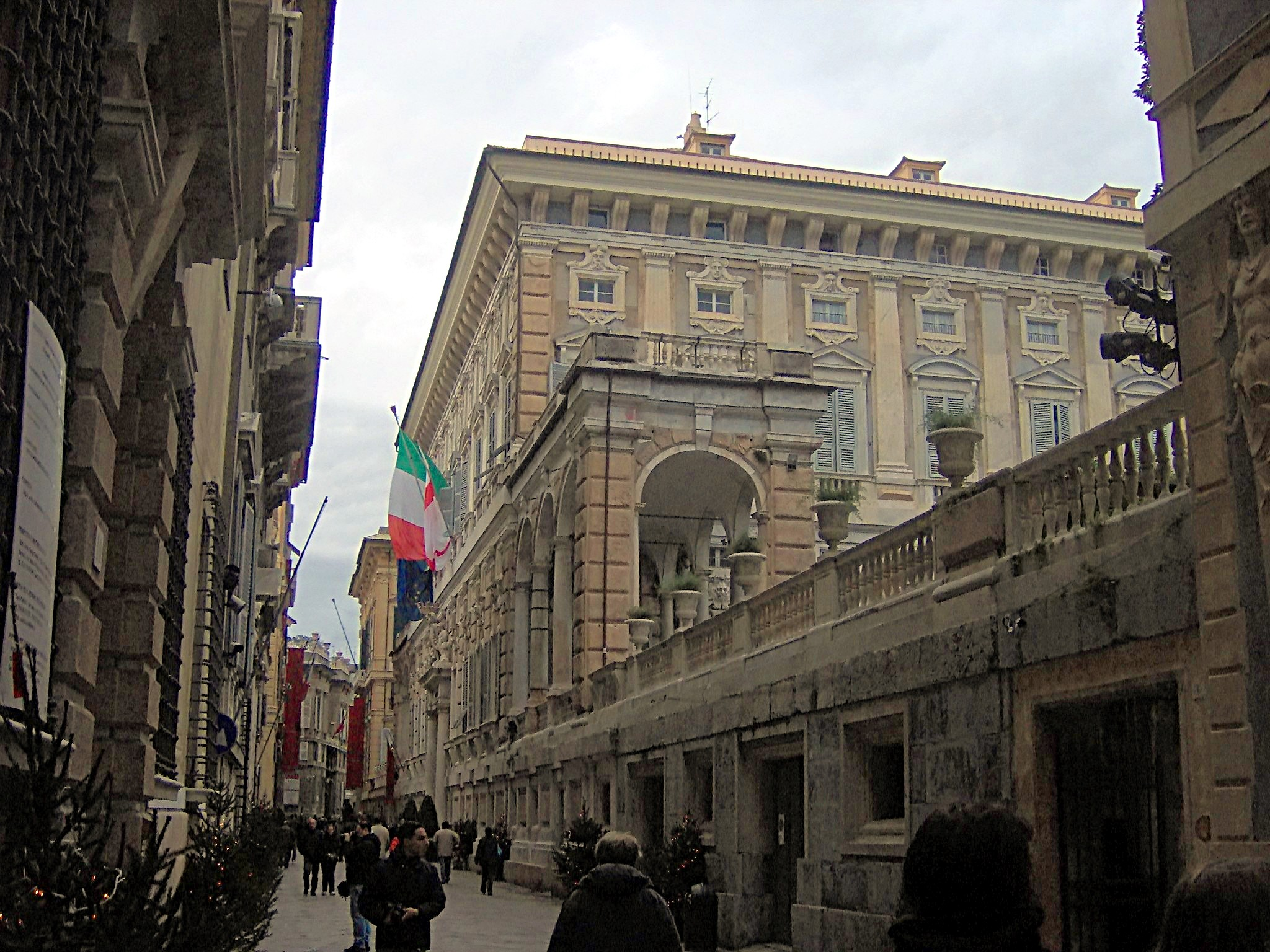 Via Garibaldi - Il palazzo del Municipio di Genova (Palazzo Doria Tursi)